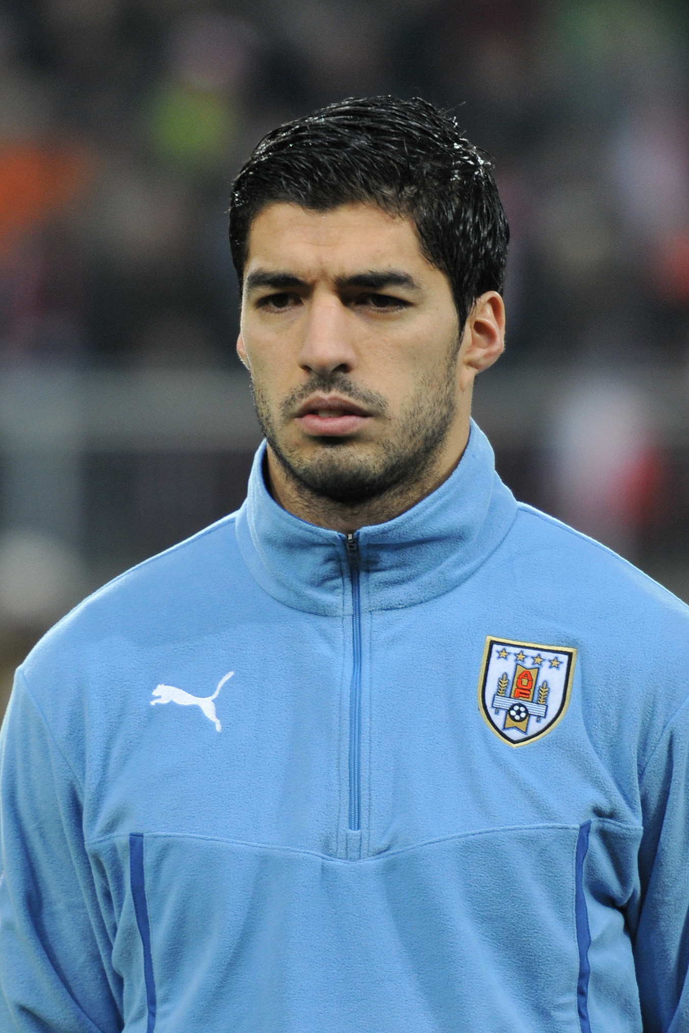 Freundschaftliches Länderspiel Österreich - Uruguay am 5. März 2014 in Klagenfurt: Luis Suárez